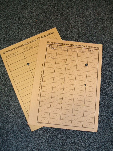 Sogenannte Stellmappen (Stelldeckel) der Bundesversicherungsanstalt für Angestellte